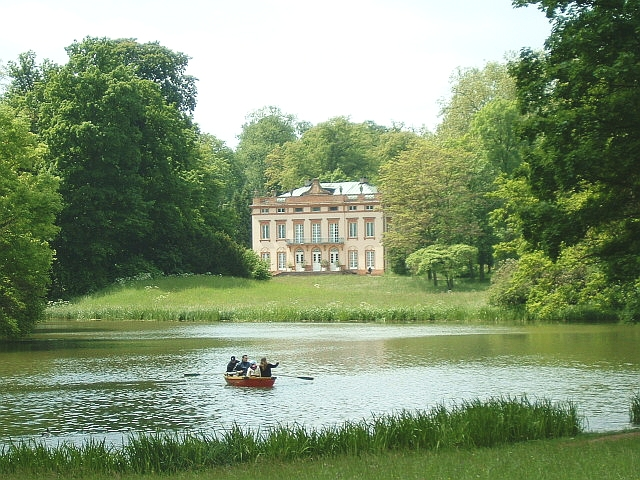 Autor:Peng 17:12, 18 May 2005 (UTC) Date:18.05.05 Bild: Schloss im Park Schönbusch bei Aschaffenburg